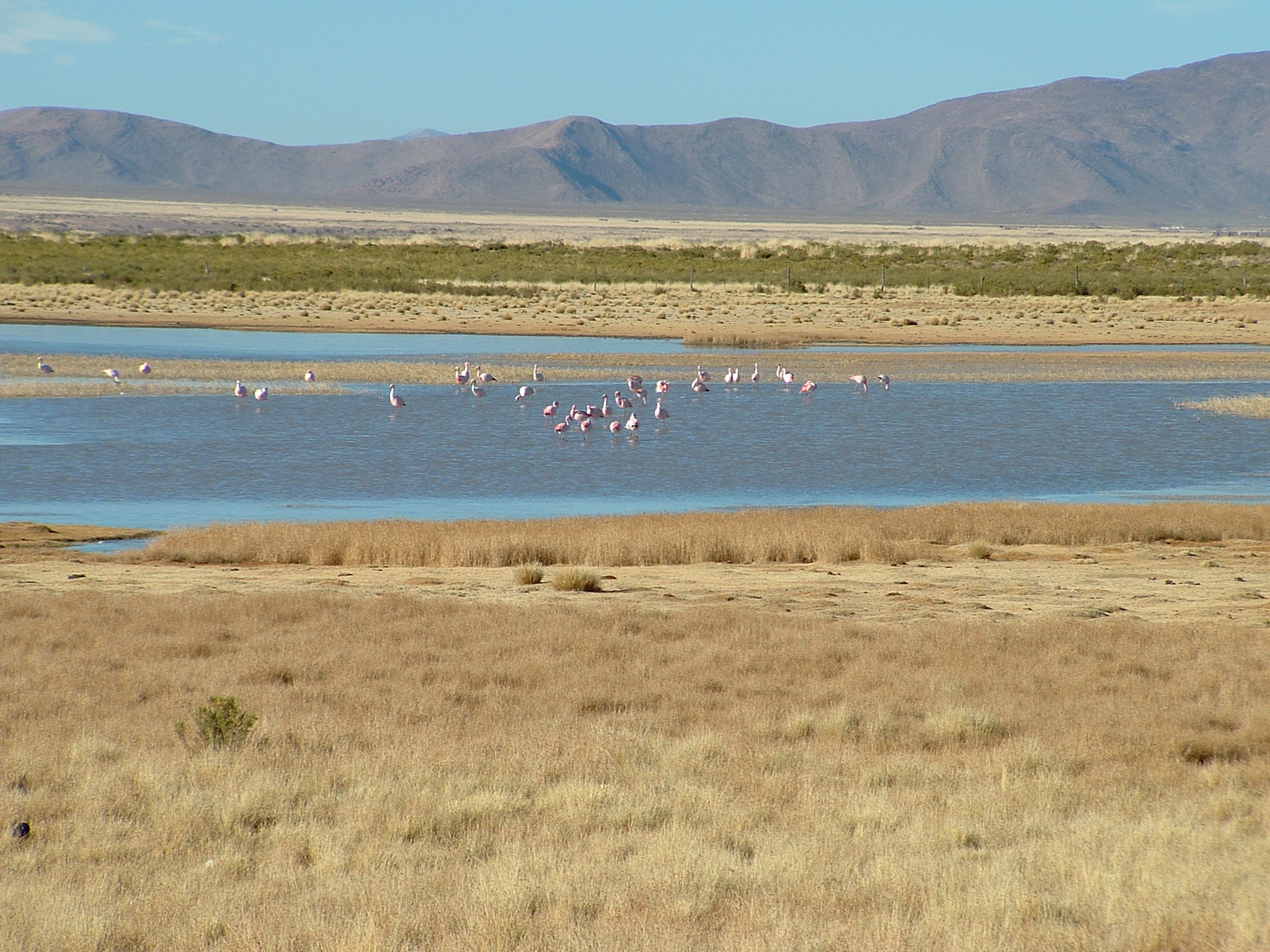 Laguna Runtuyoc ubicada al pie del cerro